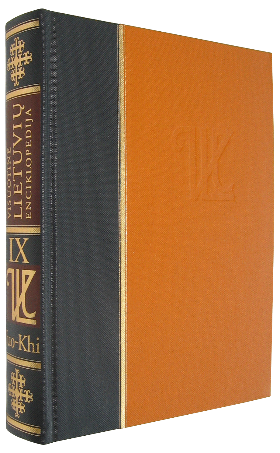 Visuotinė Lietuvių enciklopedija (Tomas Nr. 9, Juo-Khi)